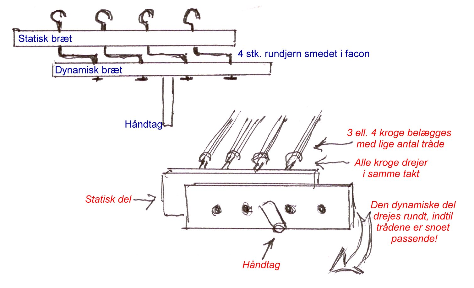 Rebslagerstand, faststående del. Se beskrivelse under reberbane.